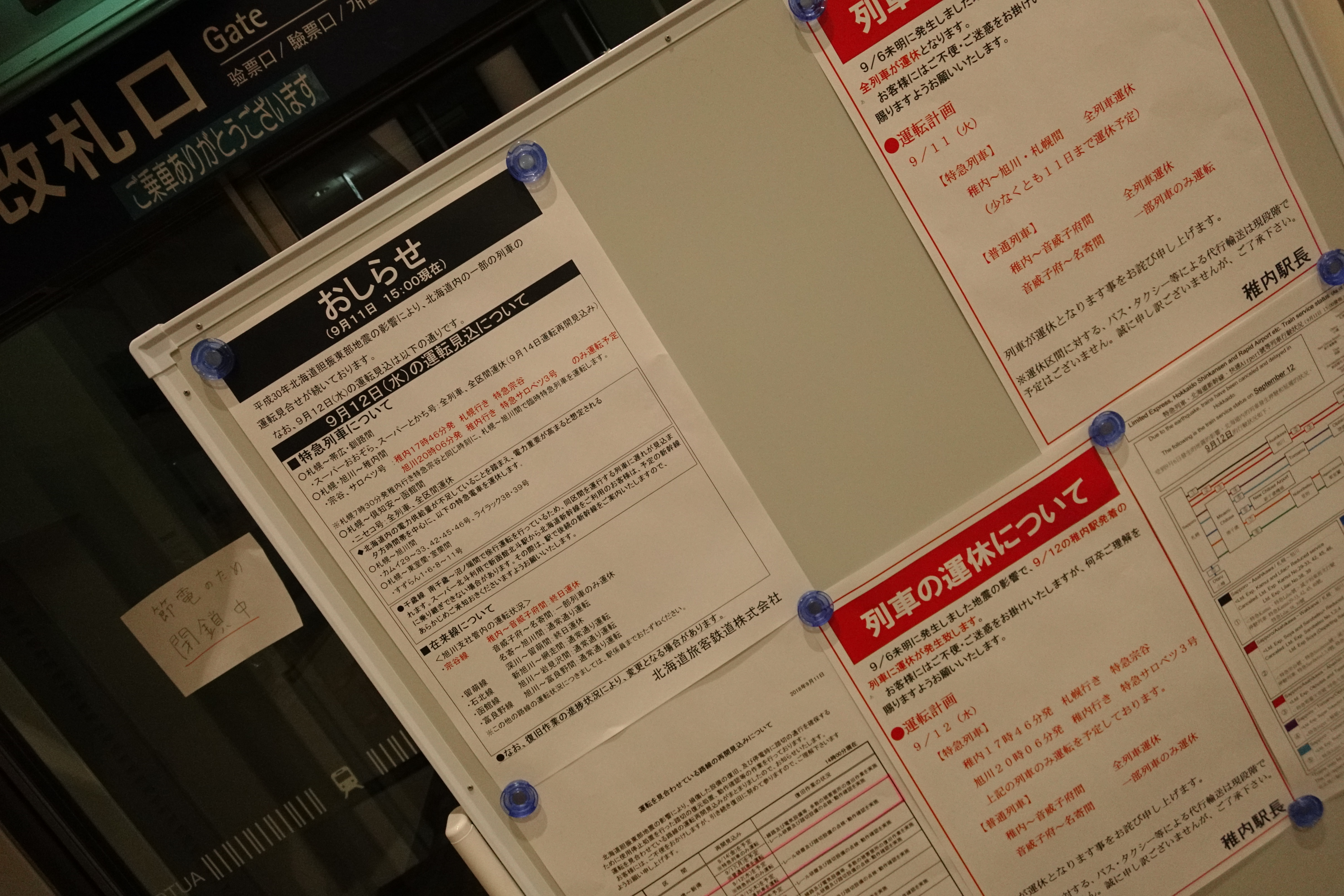 特急は明日12日から、普通は明後日以降